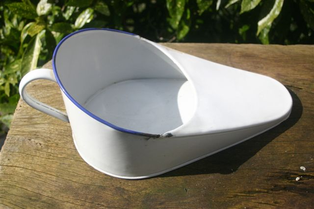 Ondersteek uit begin 20ste eeuw